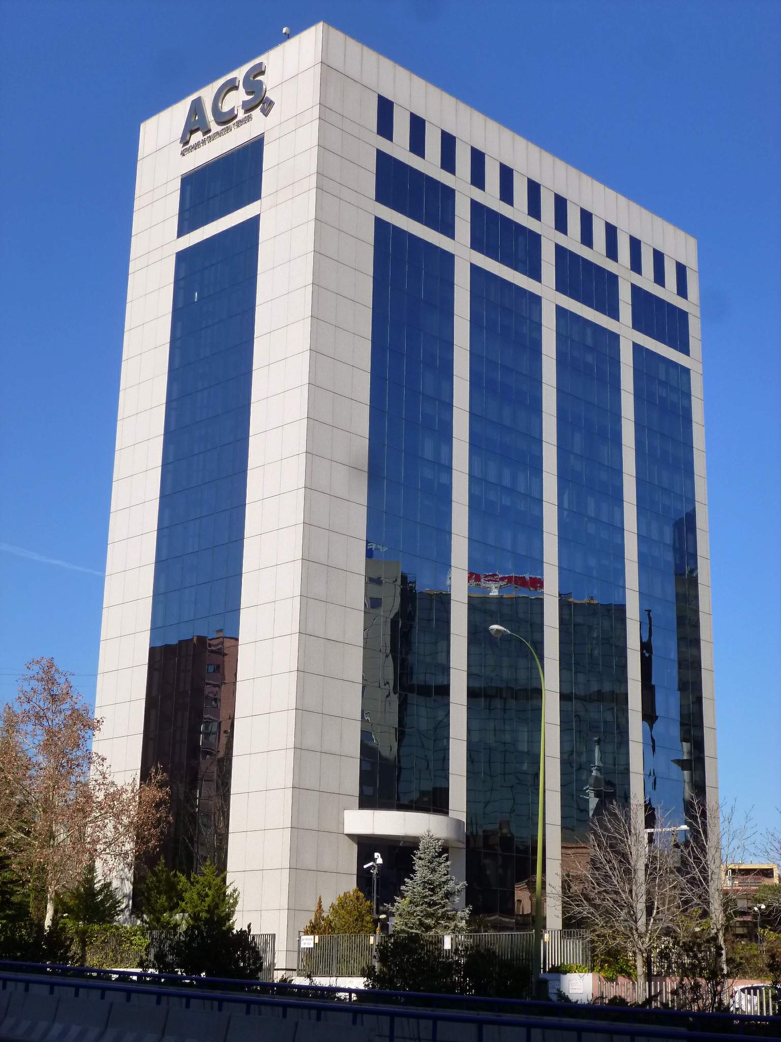 Edificio ACS (Madrid)